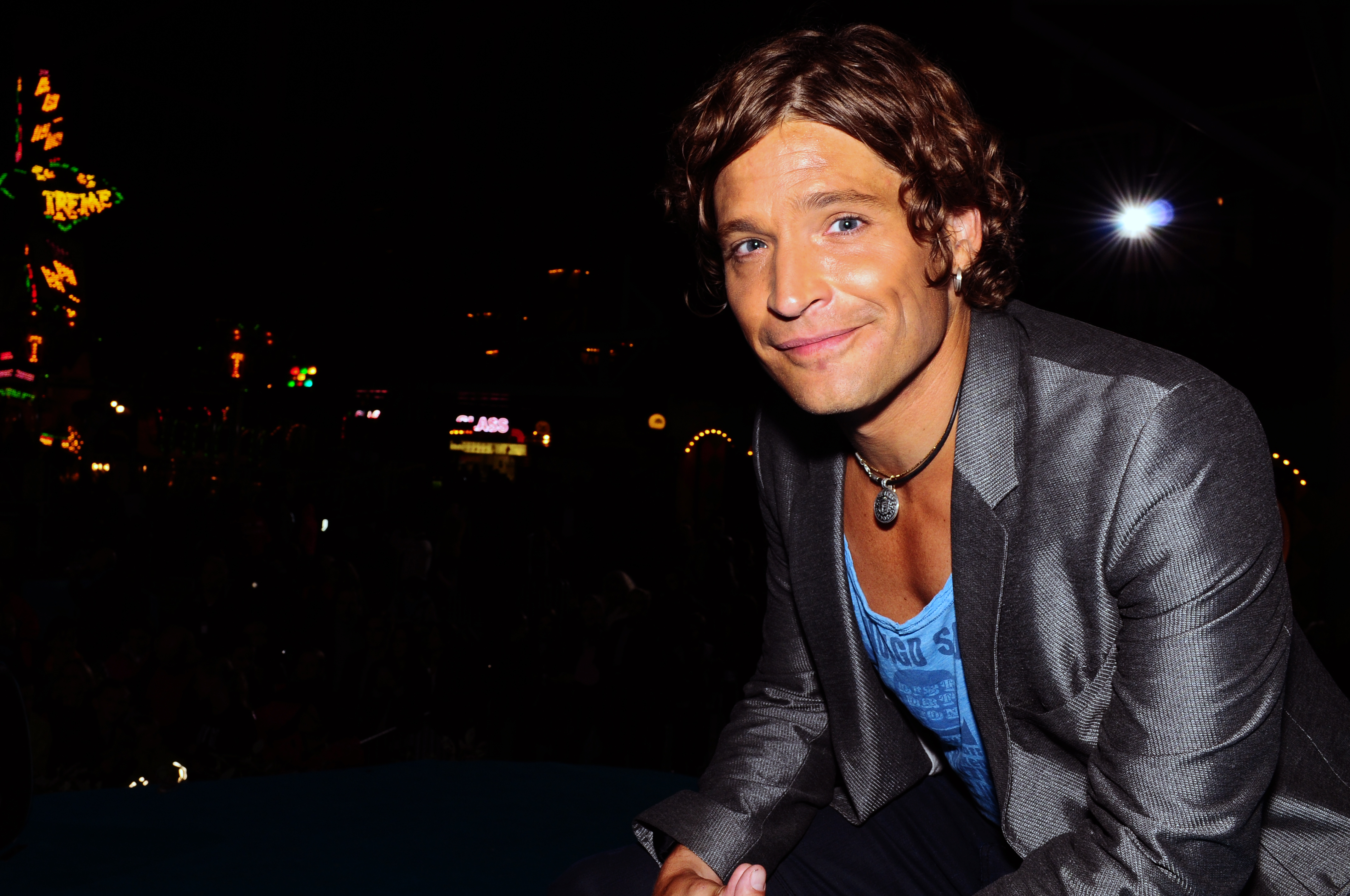 Andreas Johnson på Sommarkrysset